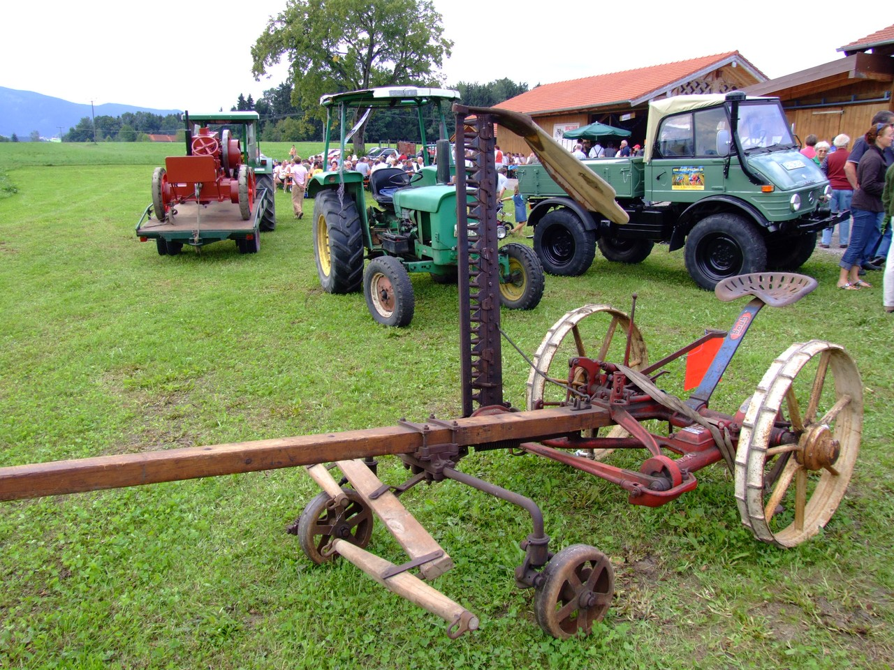 Bautz Nr. 20, pferdegezogene Mähmaschine mit Mittelschnitt-Messerbalken